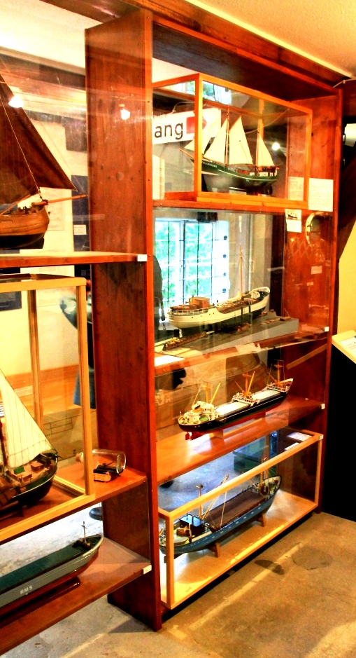 Modelle von Küstenschiffen im Museum_Wischhafen